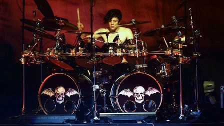 Arin en un concierto con Avenged Sevenfold.